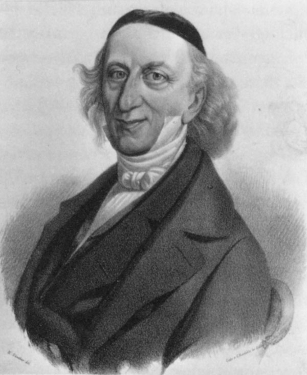 Jakob Wilhelm Speyerer (* 23. August 1789 in Frankenthal; † 13. Februar 1876 in Heidelberg), badischer Landtagsabgeordneter und Bürgermeister von Heidelberg